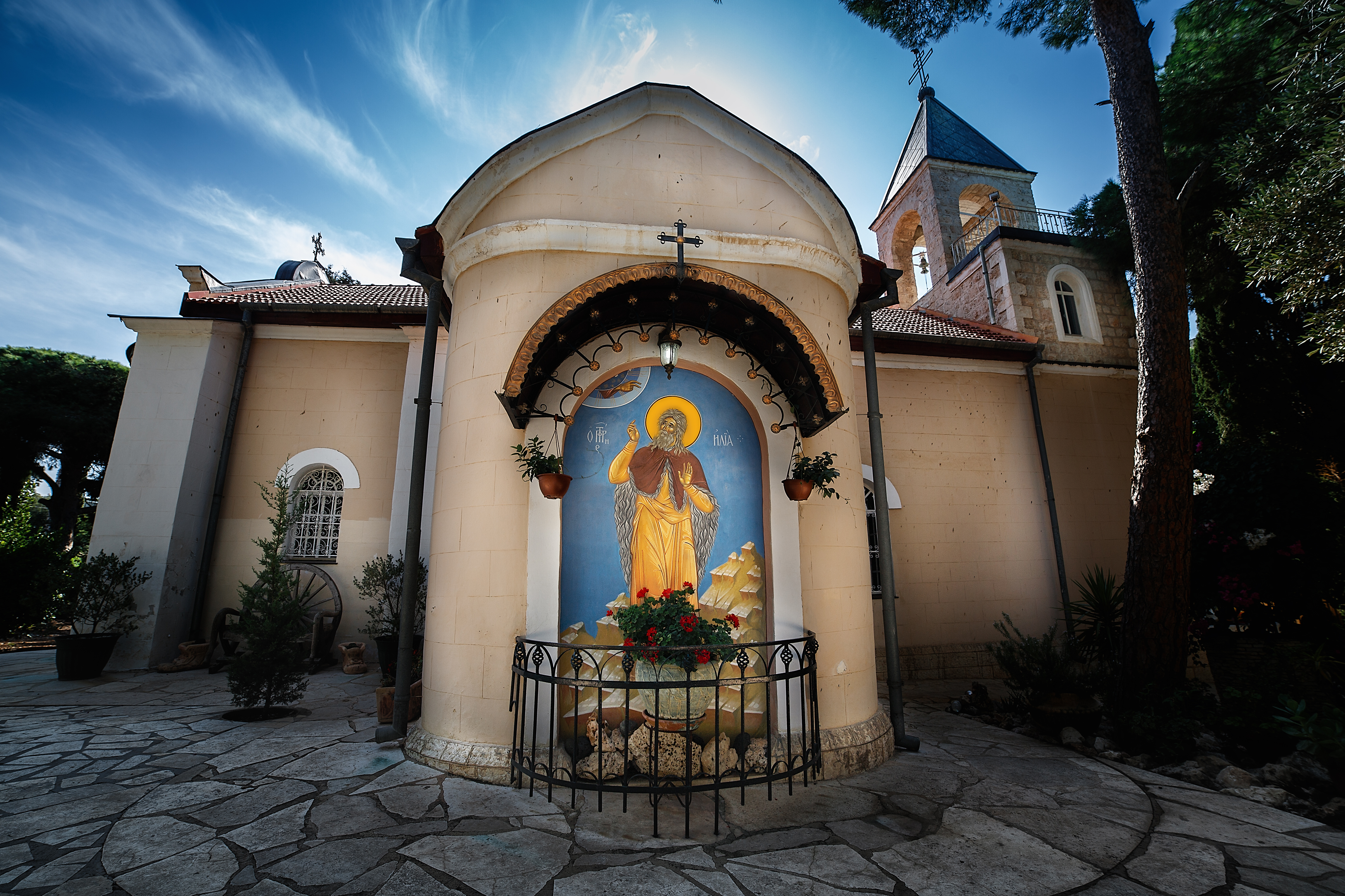 הכנסייה הפרובוסלבית במרכז הכרמל בחיפה